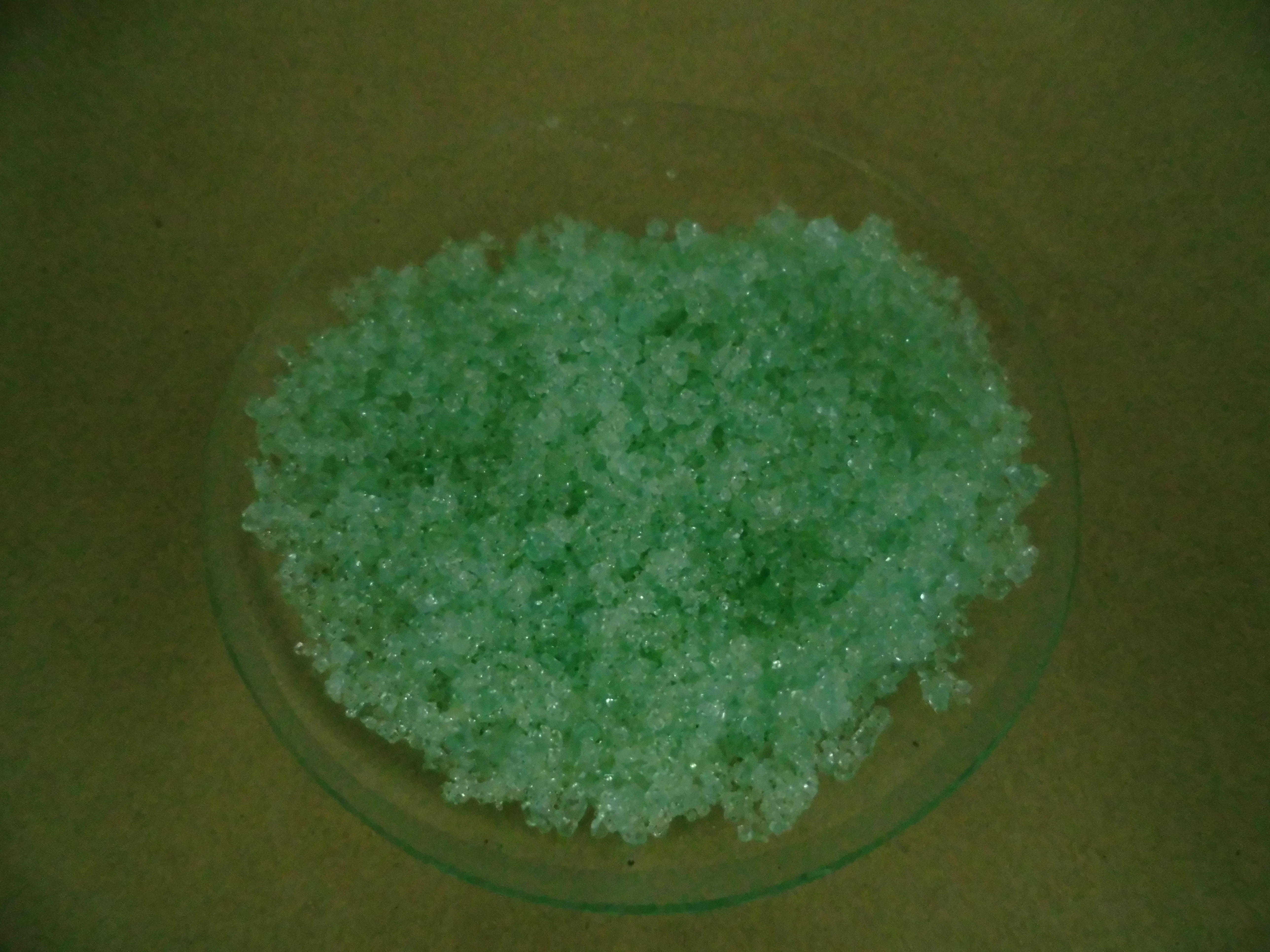 七水合硫酸铁(II)，AR，含量（以FeSO4·7H2O计）99.0~101.0%。